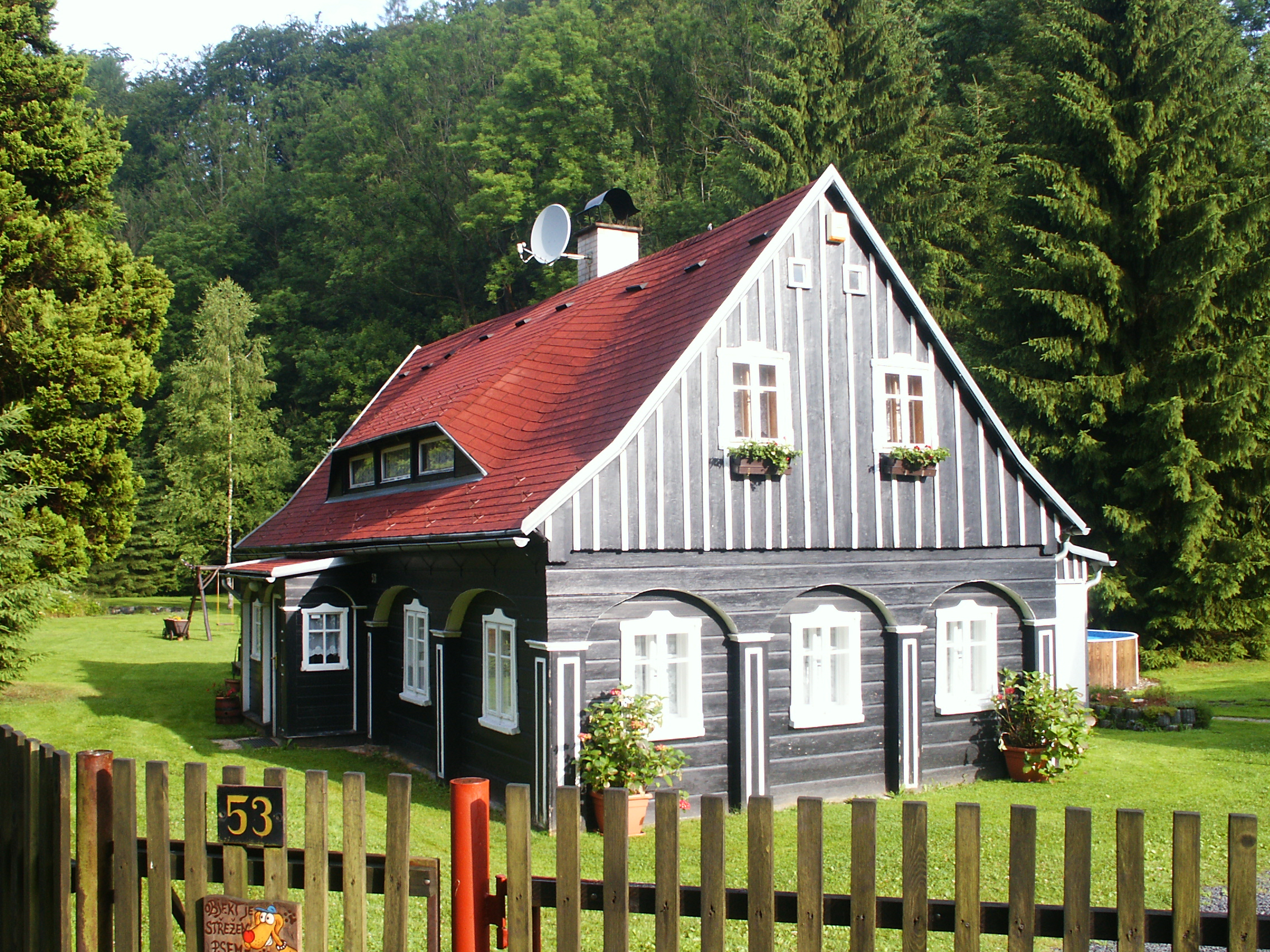 Dlouhý Důl - č.p. 53